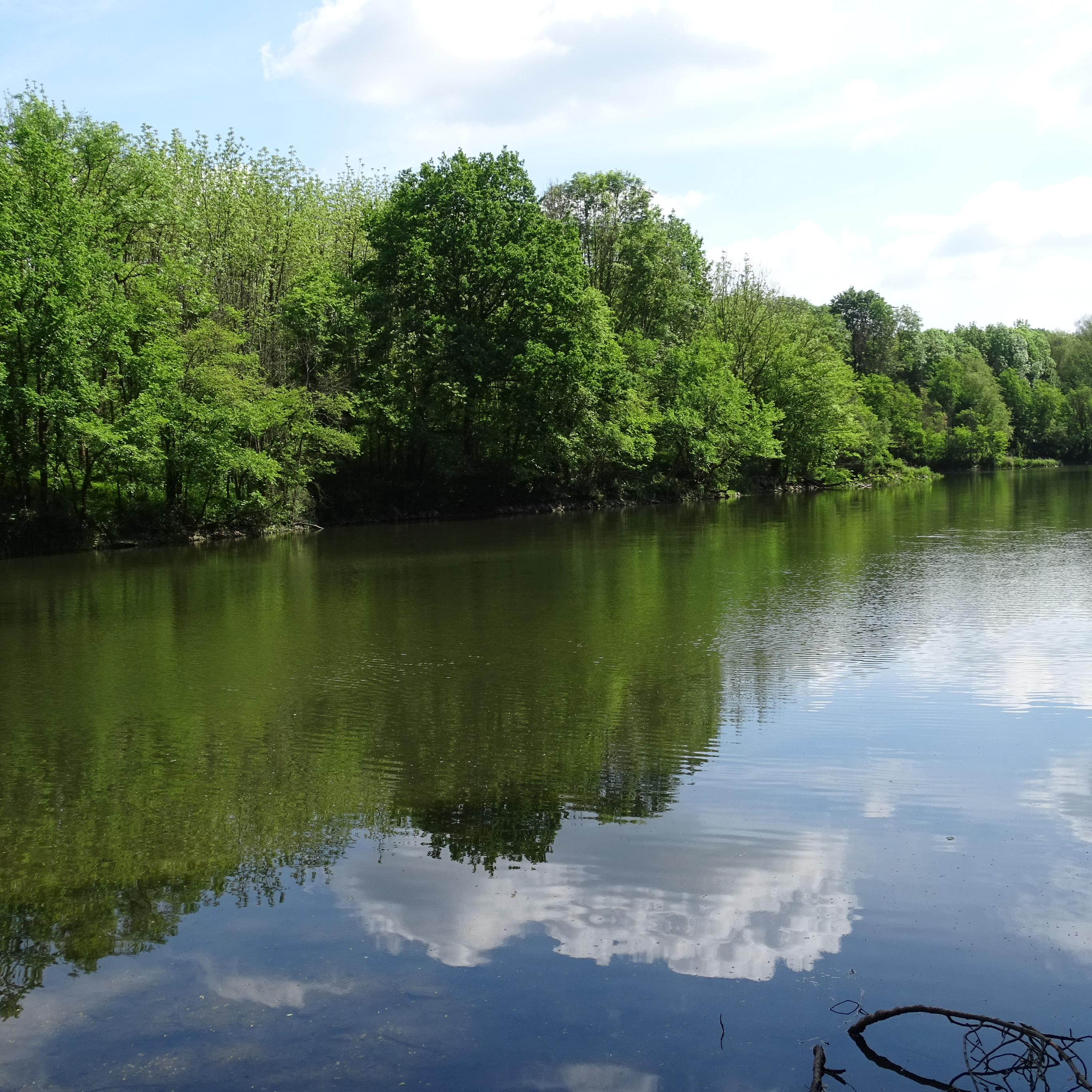 Der Saalealtarm im Auenwald Plötzkau im FFH-Gebiet DE-4236-301 „Auenwälder bei Plötzkau“. Blick von einer Bank in Lesewitz. Abgebildeter Bereich an der Gemeindegrenze zwischen Plötzkau und Könnern im Salzlandkreis.